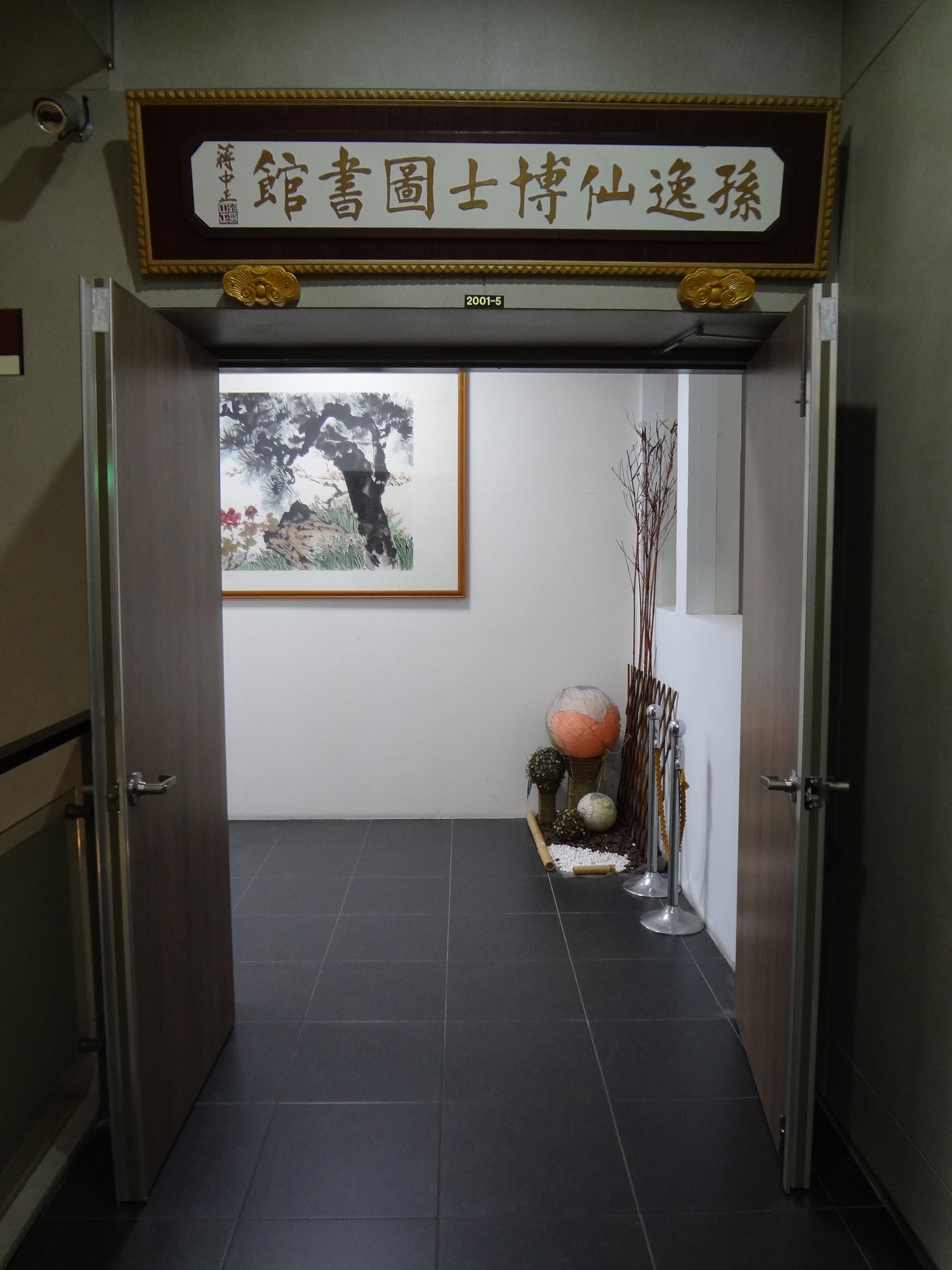 國立國父紀念館孫逸仙博士圖書館大門，上方懸掛蔣中正題字匾額。